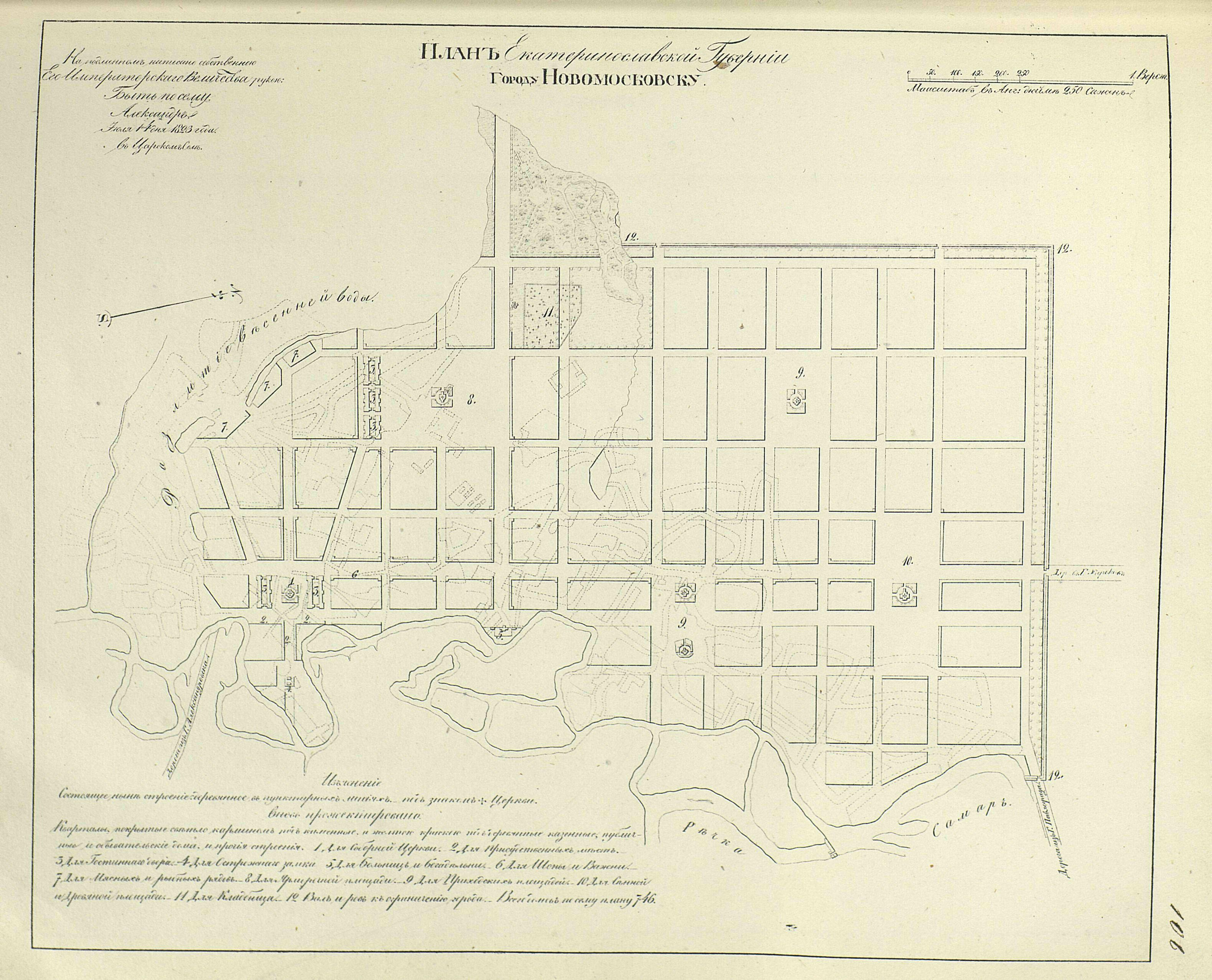 Полное Собрание Законов Российской Империи. Собрание первое. Книга чертежей и рисунков. (Планы городов).; 1839, Санктпетербургъ, Въ Типографіи II Отделенія Собственной Е. И. В. Канцеляріи.